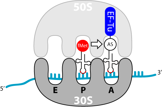 Elongation der Translation Thumbnail